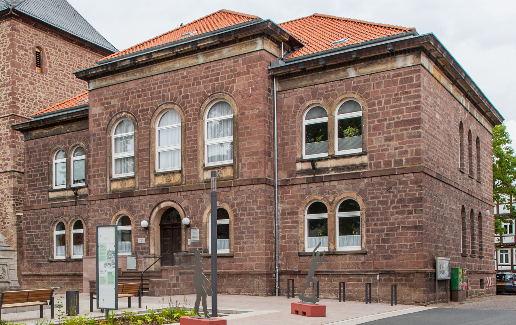 Altes Amtsgericht in Blomberg (Kreis Lippe) This is a photograph of an architectural monument.